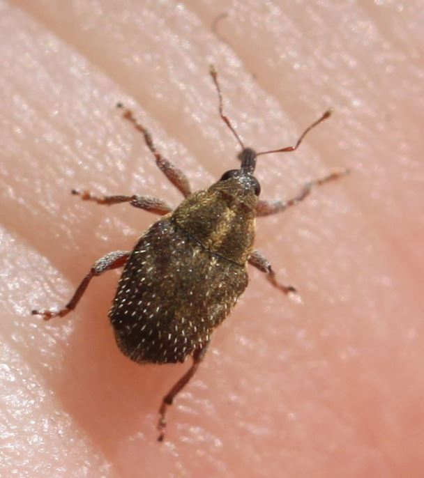 Rüsselkäfer Trichosirocalus troglodytes am 1. Juni 2019 in der Schwetzinger Hardt